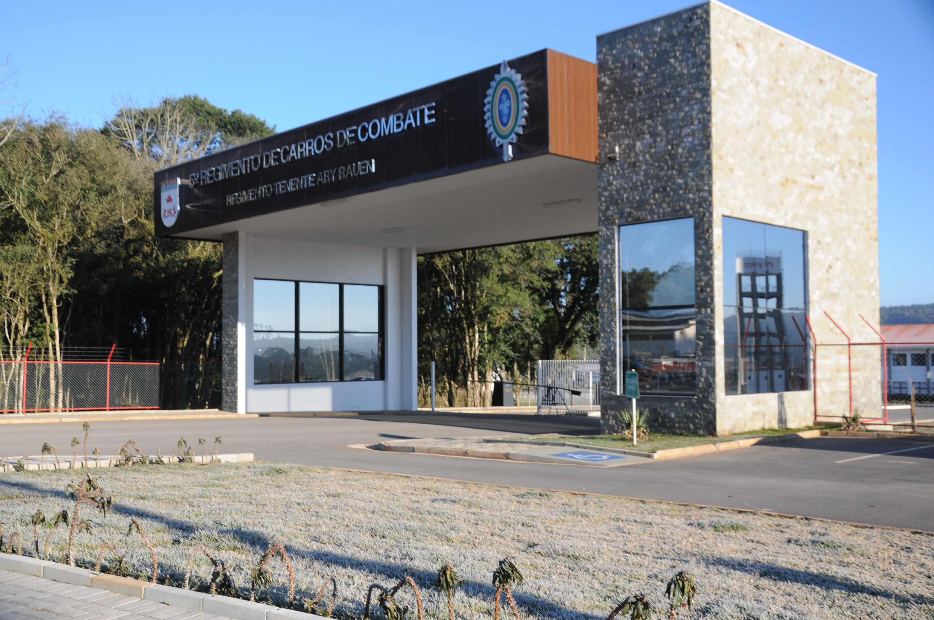 Entrada do Regimento